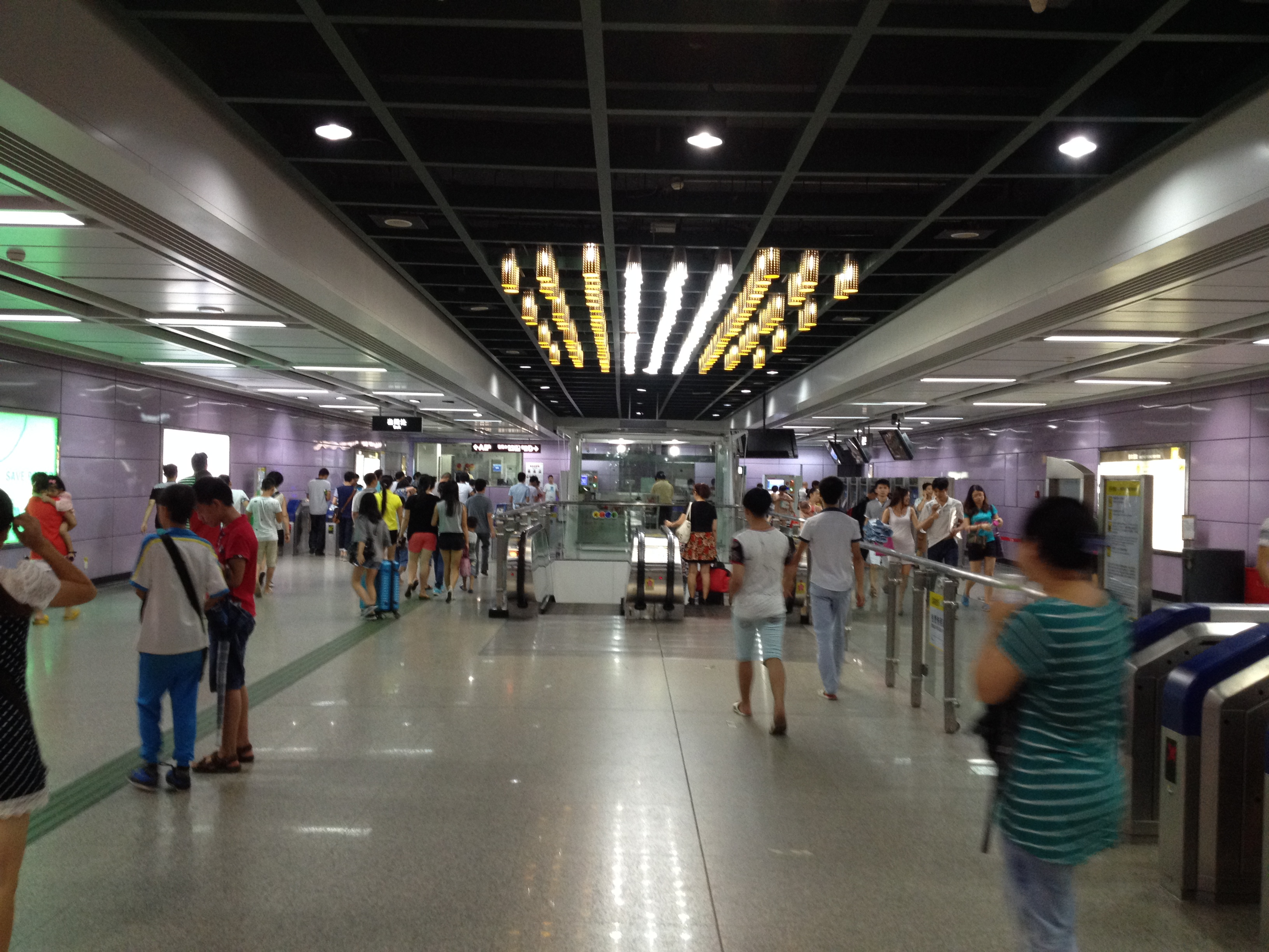 广州地铁3号线大塘站站厅